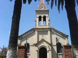 Iglesia Parroquial de Santa Rosa de Leales. Departamento Leales. Tucumán.